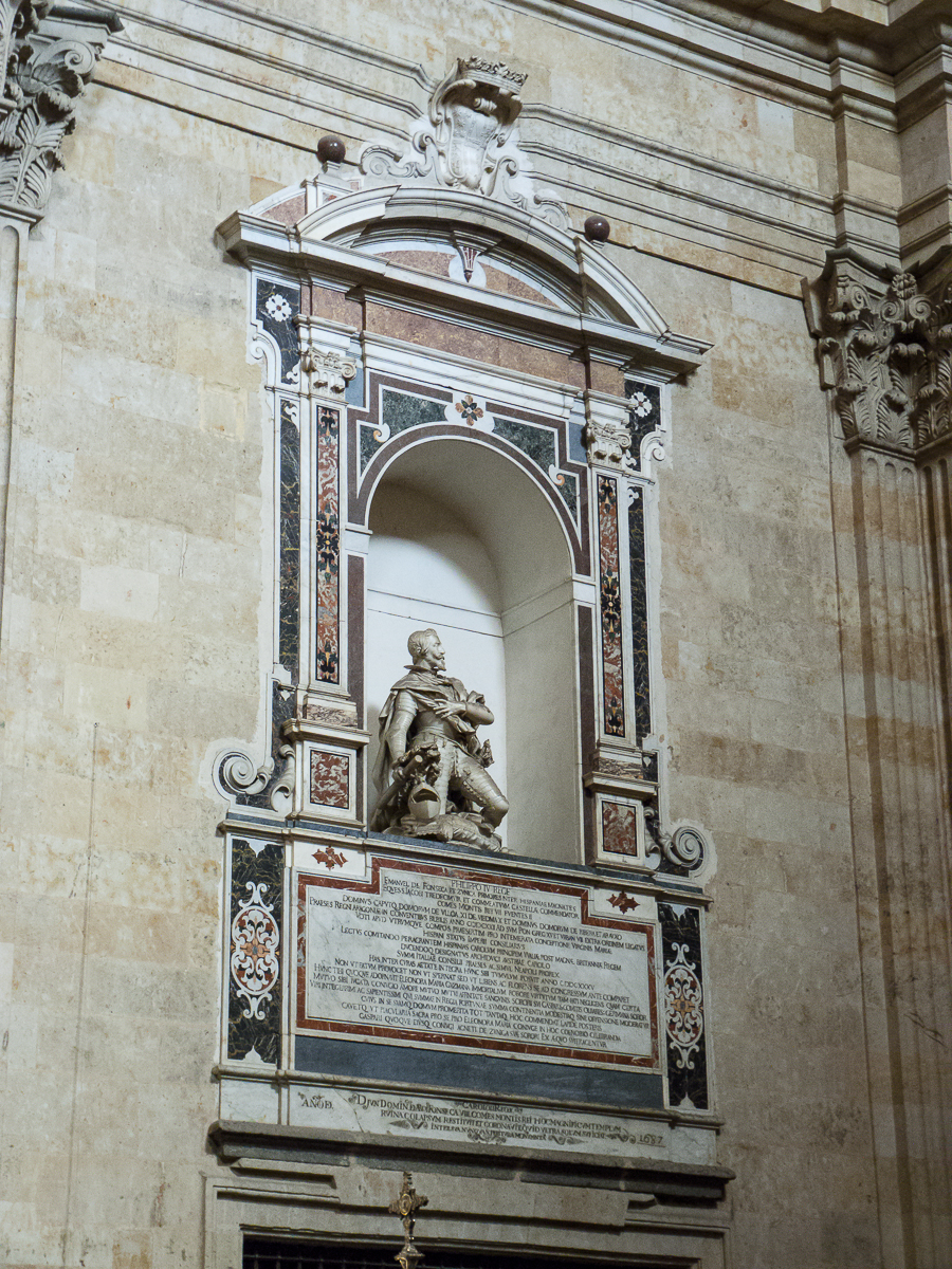 Sepulcro de Manuel de Acevedo y Zúñiga (1586-1653), VI conde de Monterrey y II conde de Fuentes de Valdepero. El sepulcro se halla, al igual que el de su esposa, en el convento de las Agustinas de Salamanca, (España). También fue Grande de España, presidente del Consejo de Castilla y comendador de la Orden de Santiago.